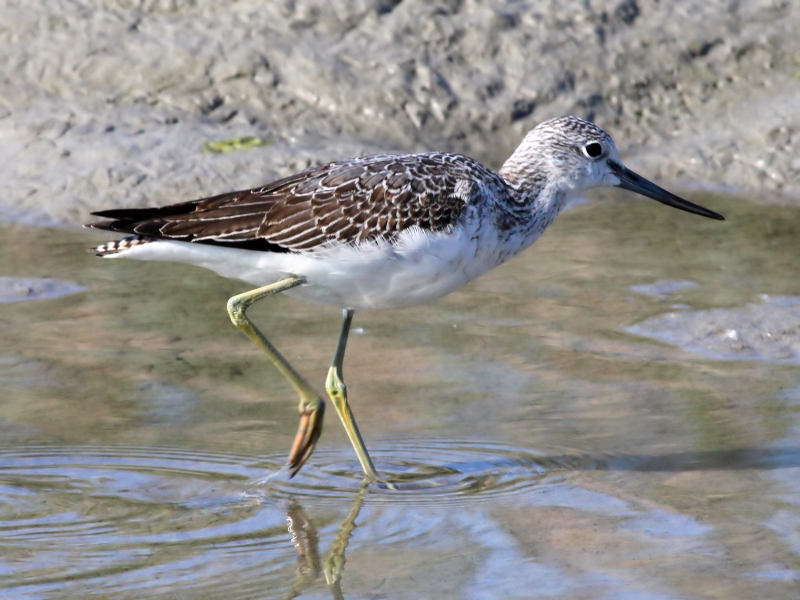 Greenshank (Tringa nebularia), Rheindamm, Vorarlberg, Austria